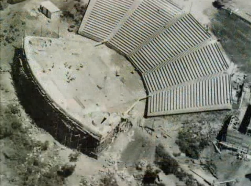 Fotografía del Anfiteatro Manuel Antonio Ramírez de la ciudad de Posadas en construcción en el año 1961.